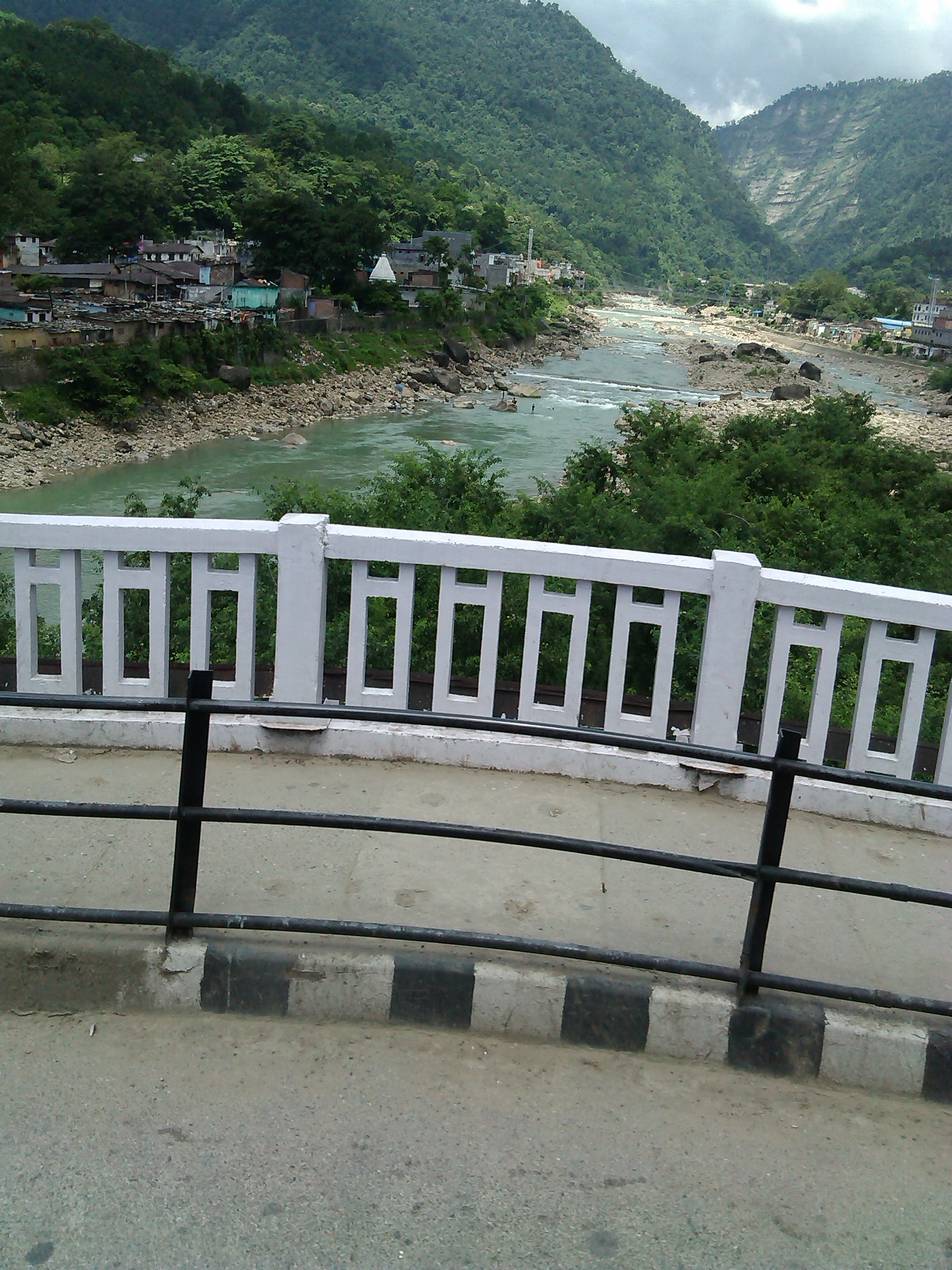 नेपाली: तिनाउ नदी नेपालको एक नदी हो। यसको उद्गम स्थल पाल्पा जिल्ला हो। यो नदी पाल्पा हुँदै रुपन्देही जिल्लामा आएको छ।